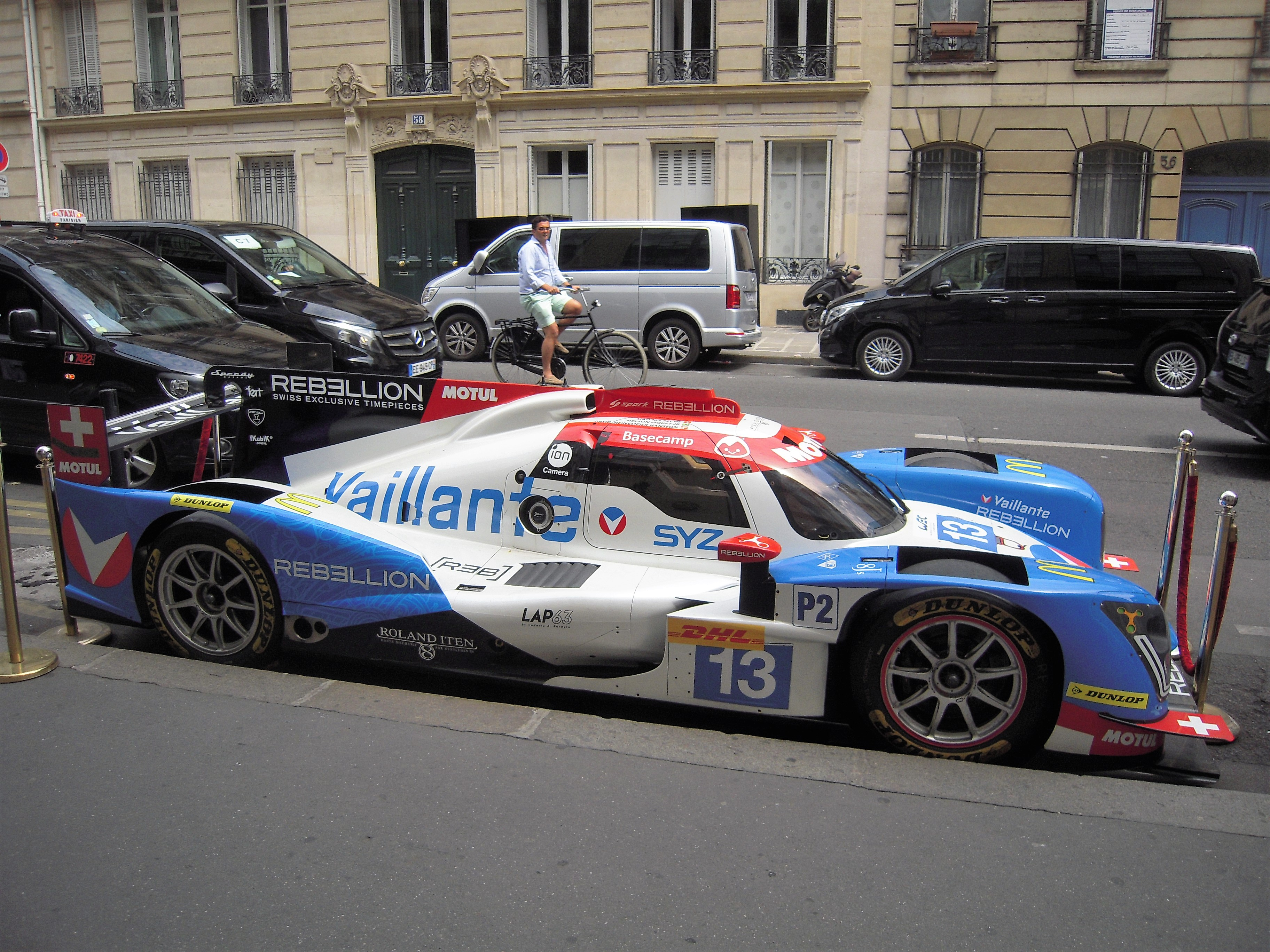 Michel Vaillant, le héros de la plus célèbre bande dessinée de sport automobile, fait son grand retour en 2017, à l’occasion de son soixantième anniversaire.